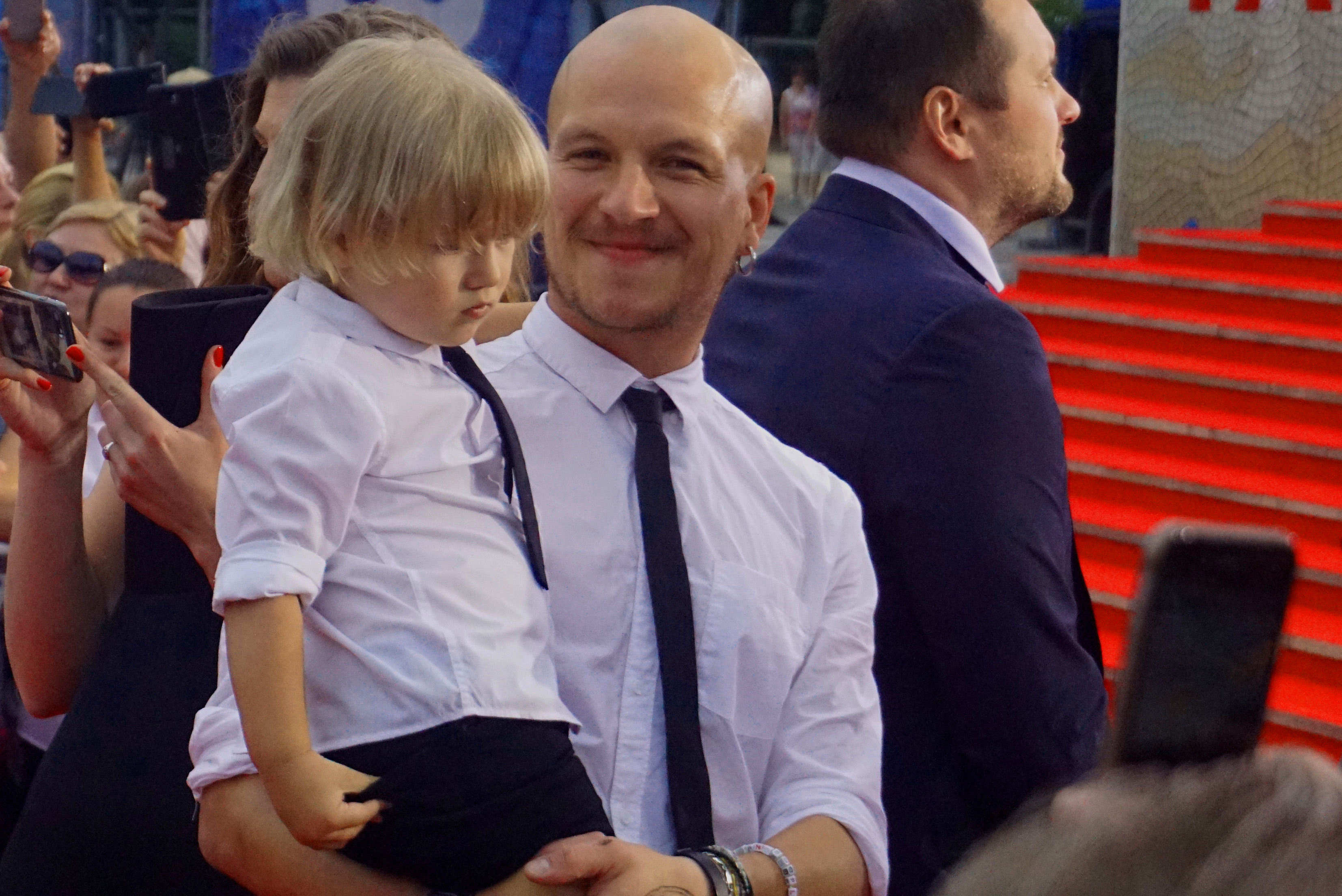 На звёздной дорожке. Марьяна Спивак с семьёй. 28 кинофестиваль "Кинотавр". Сочи, 2017 год.